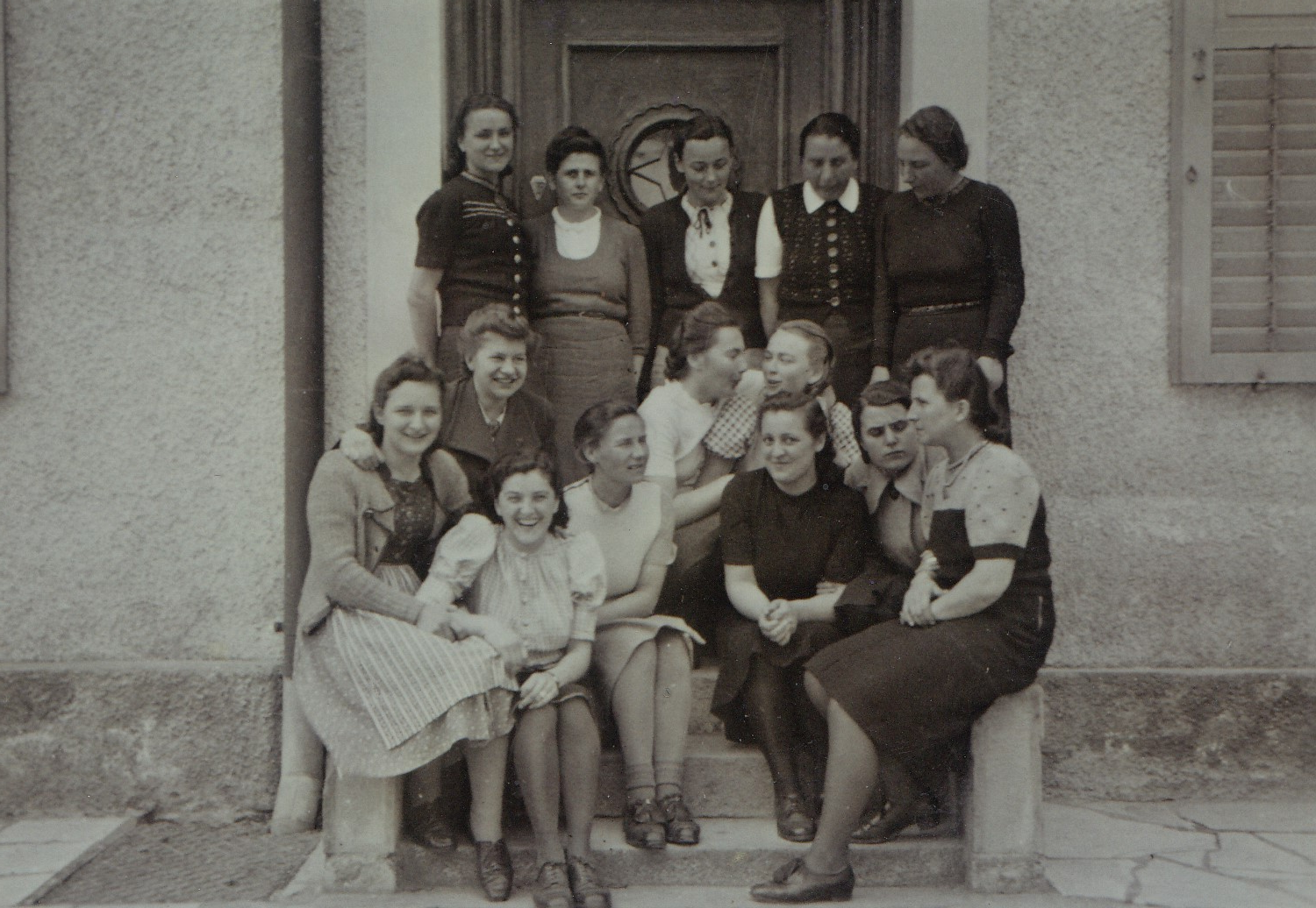 Absolventinnen des NSV.-Kindergärtnerinnenseminars in Friedberg bei Augsburg